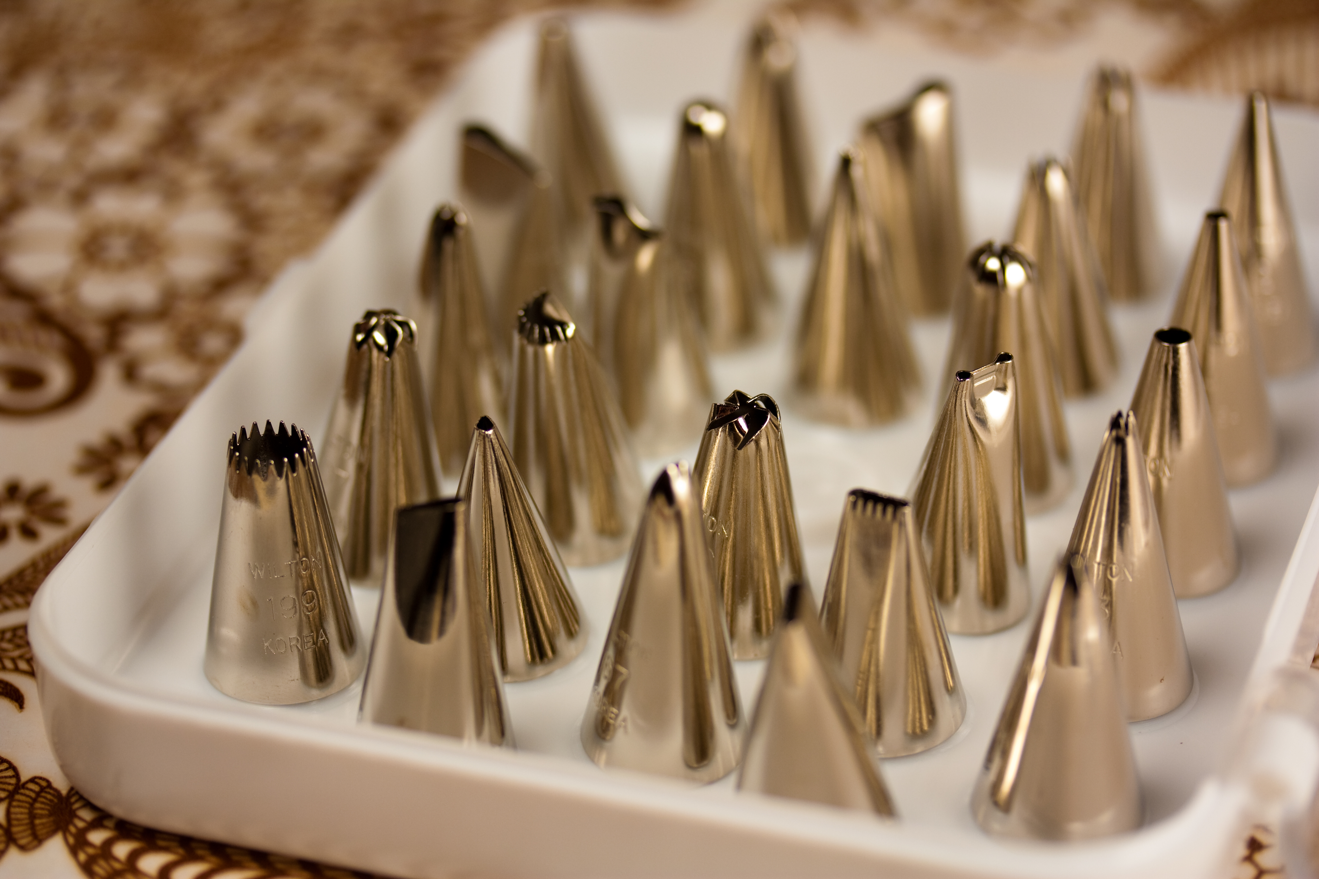 Pastry Bag Tips